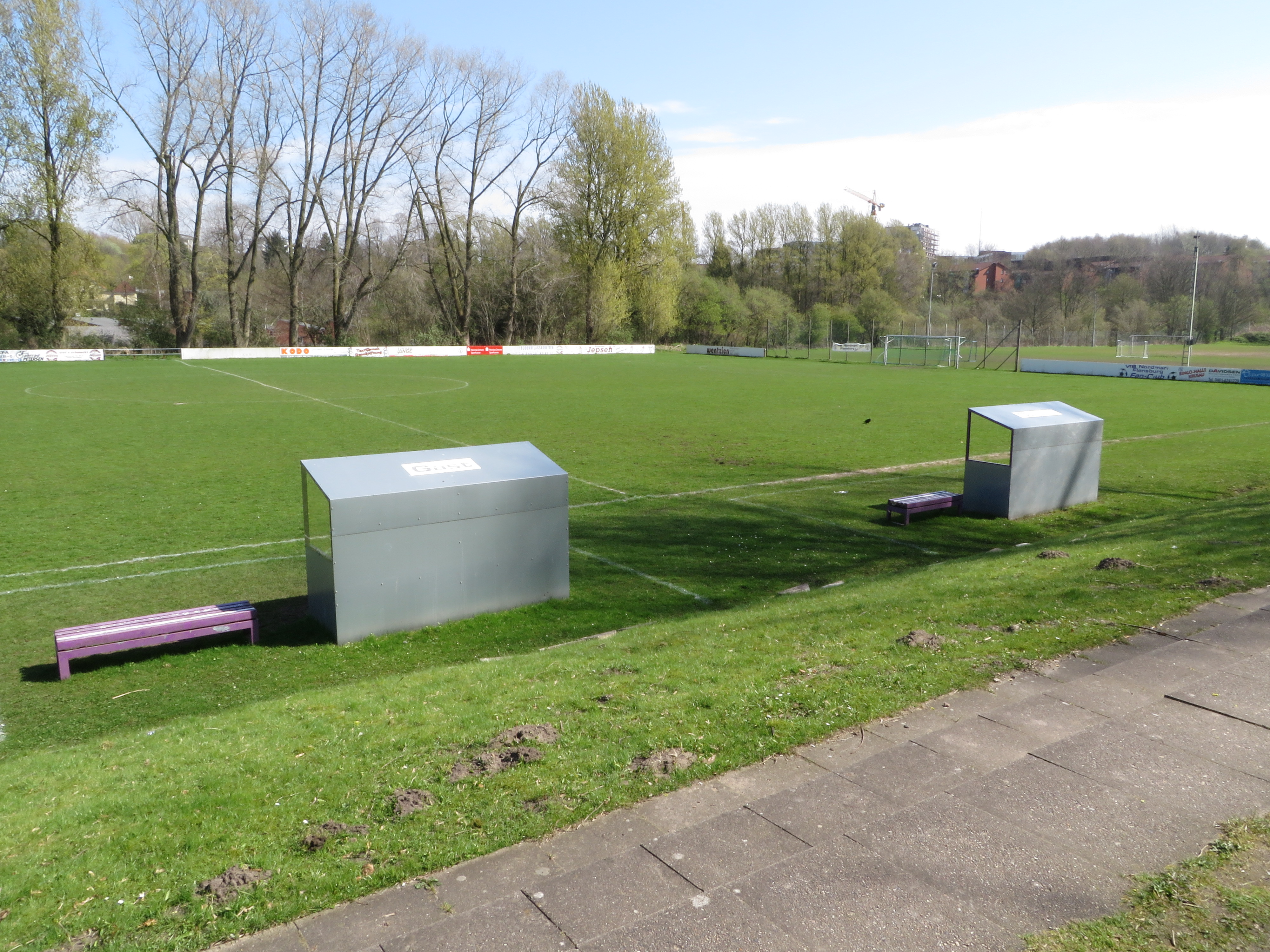 Willi-Merkl-Platz vom VfB Nordmark (April 2014), Bild 007